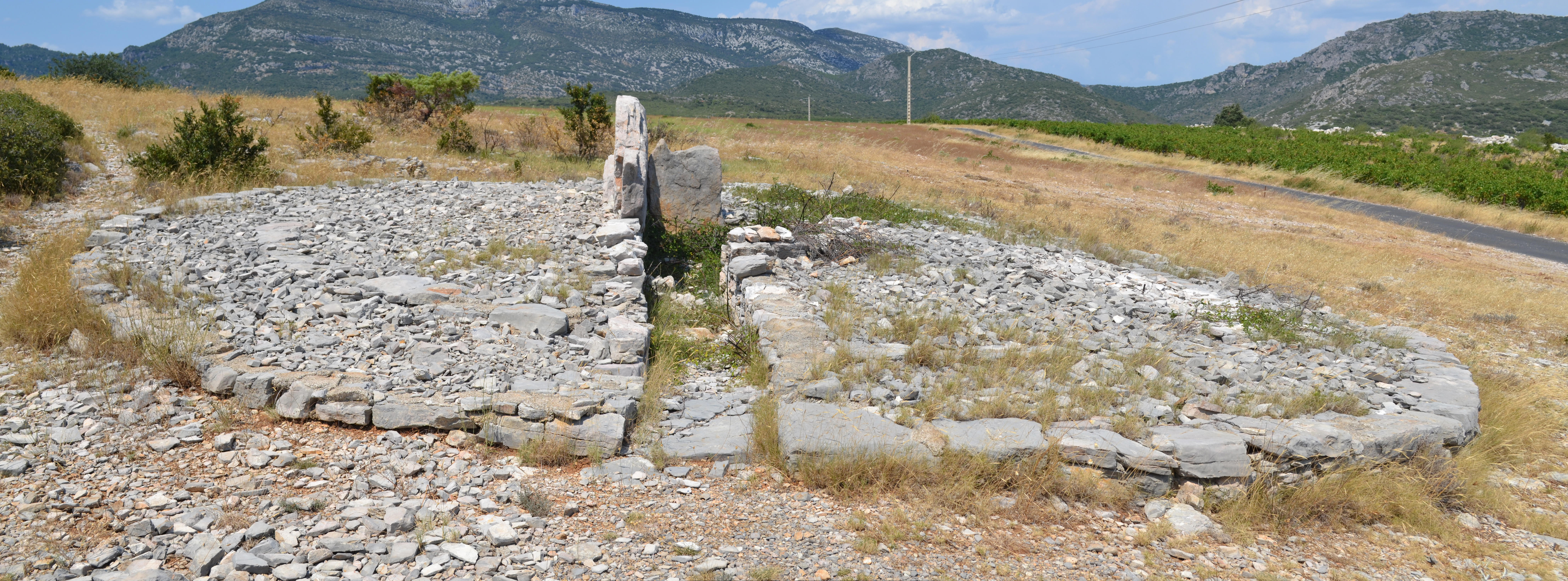 Dolmen n°1 de la Croix de l'Yeuse à Montpeyroux (34).